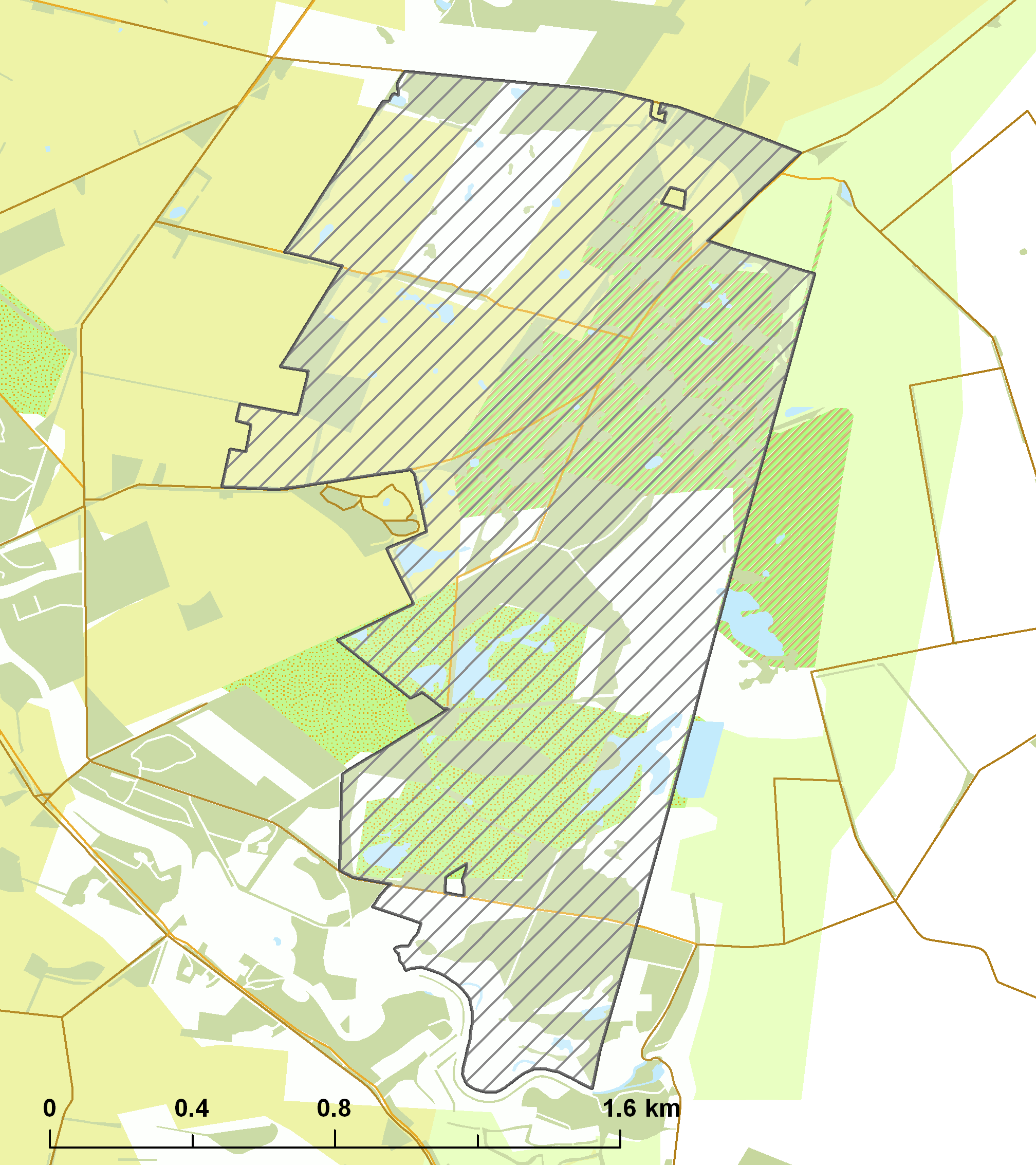 Natura2000 - Witte Veen.png